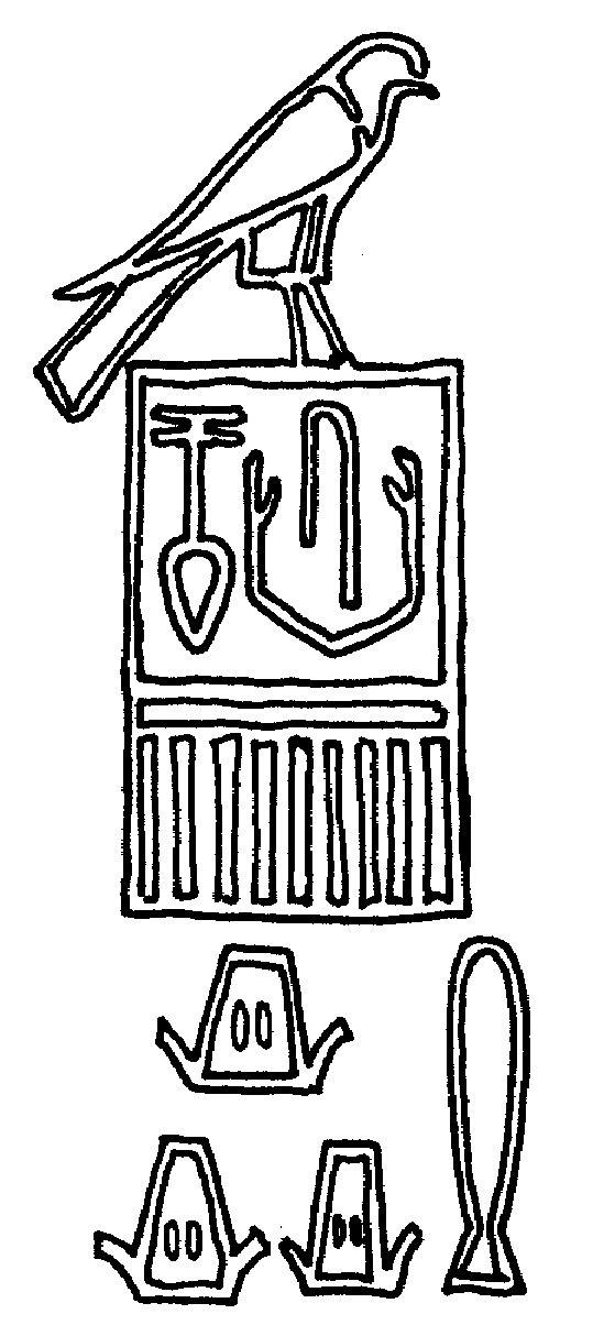 Gefäßritzung mit dem Namen des Königs Sneferka